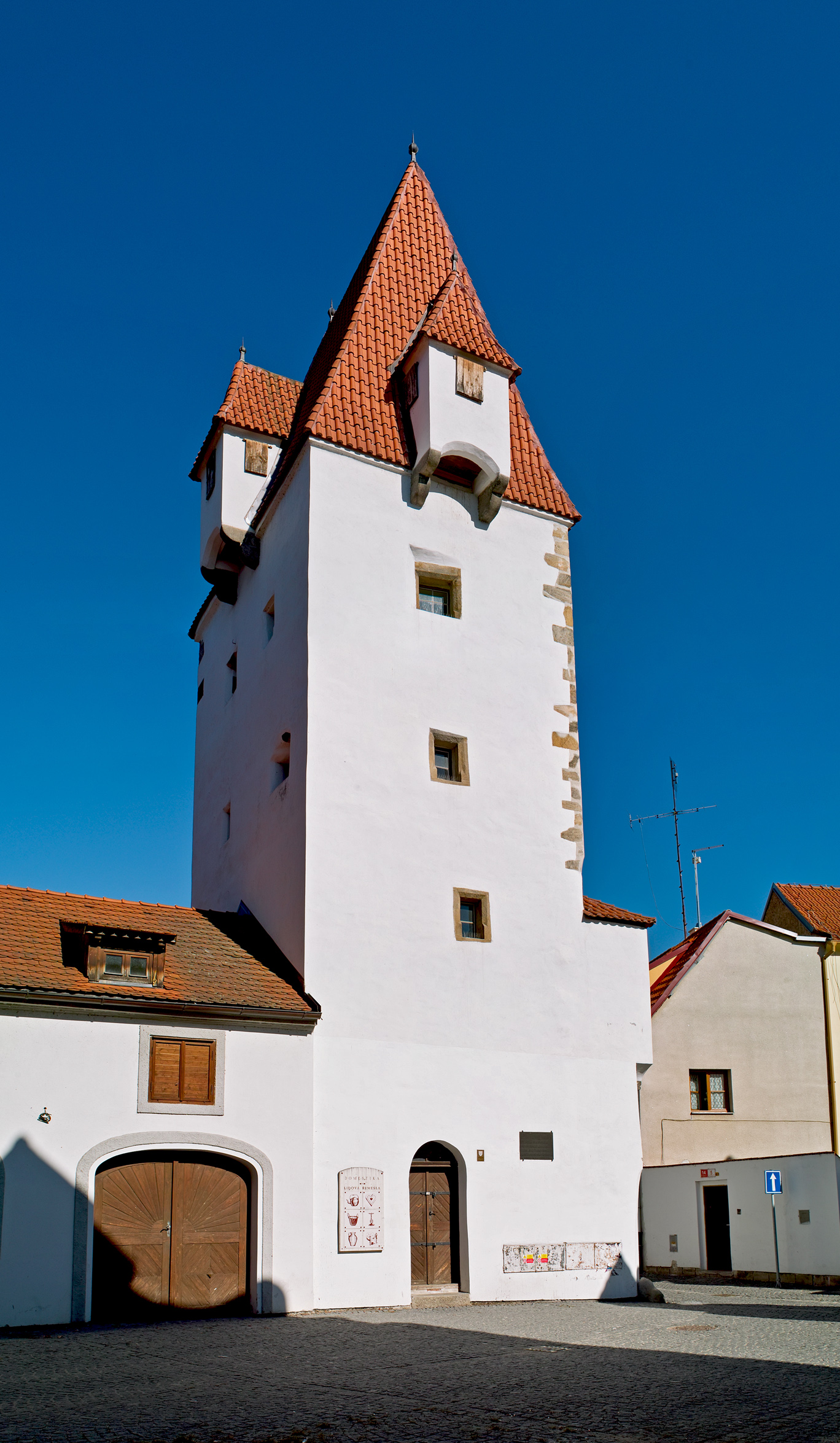 Rabštejnská věž od Mlýnské stoky